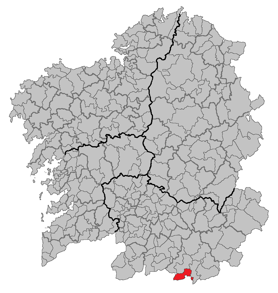 Mapa coa localización do concello de Oímbra.